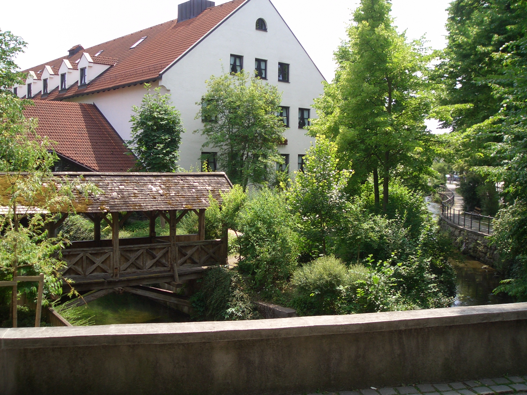 Hotel und Gasthof zur Mühle, Kirchplatz 3, links der Seebach